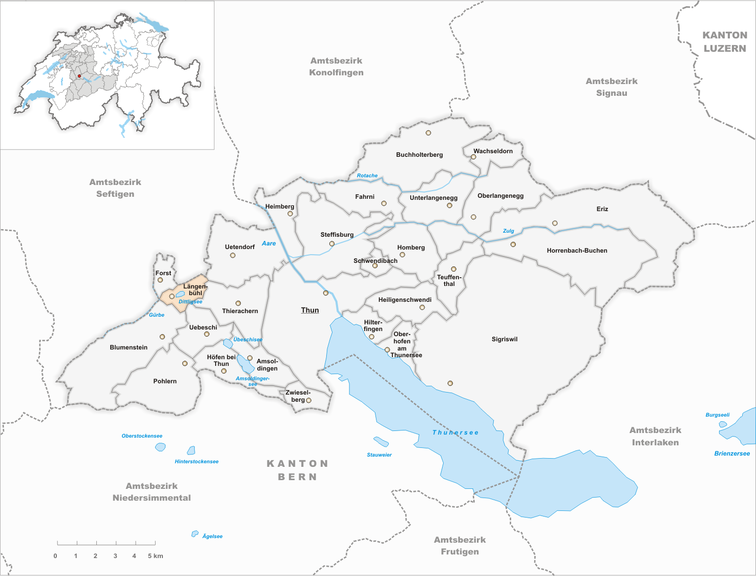 Municipality Längenbühl